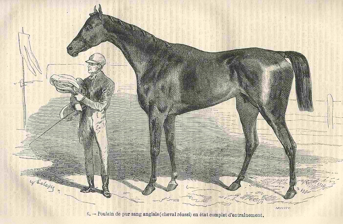 Poulain de pur sang anglais en état d'entrainement